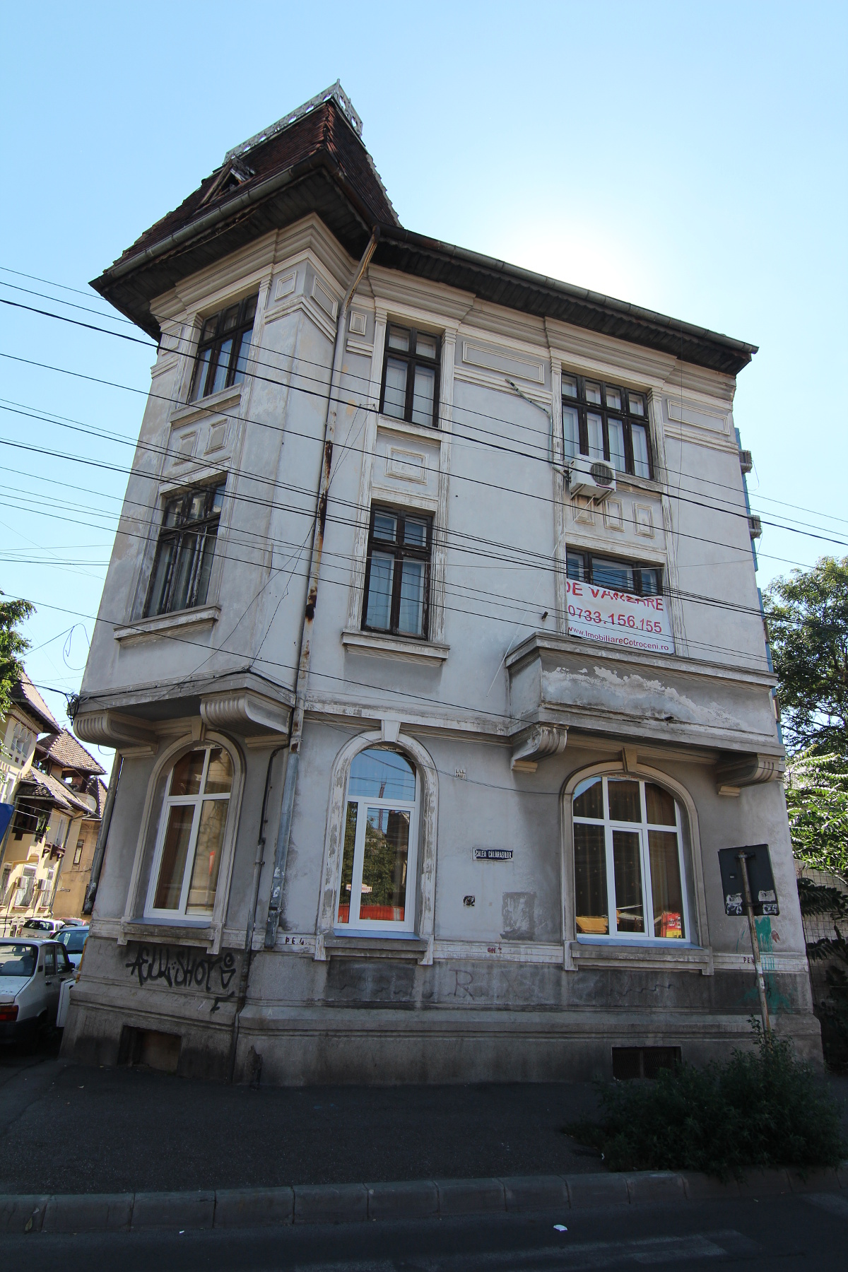 Imobil pe Calea Călărașilor